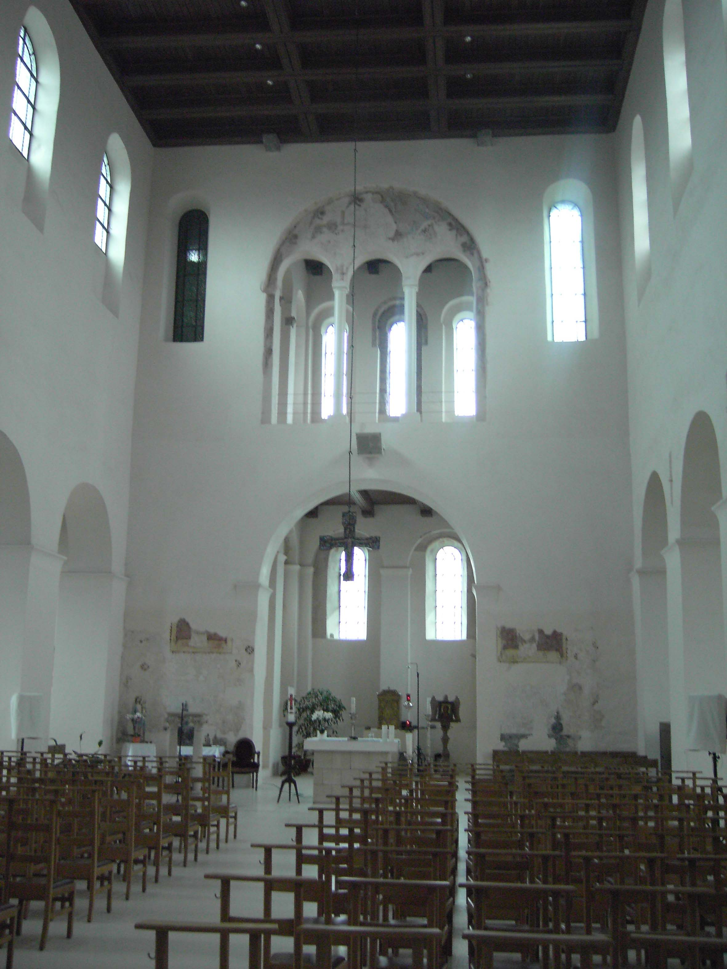 Ename - Sint Laurentiuskerk - interieur